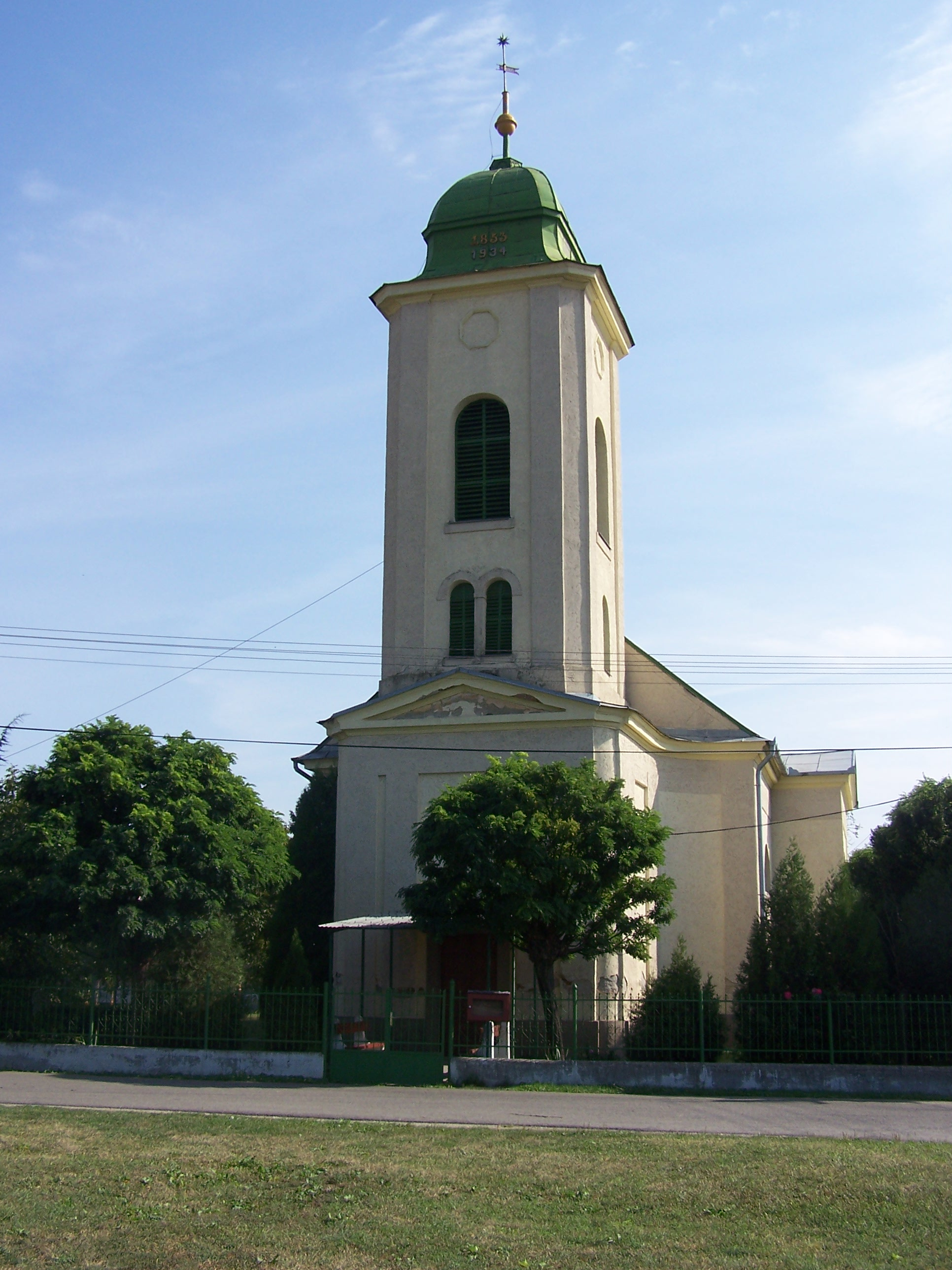 Ref. templom (Tiszapalkonya, Kossuth Lajos út 3.) This is a photo of a monument in Hungary. Identifier: 3253